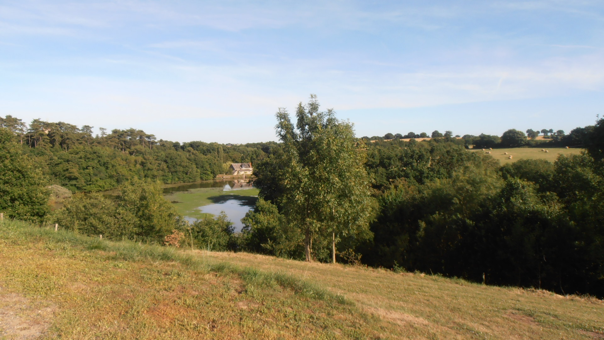 La campagne de Villemoisan en direction de Champtocé.